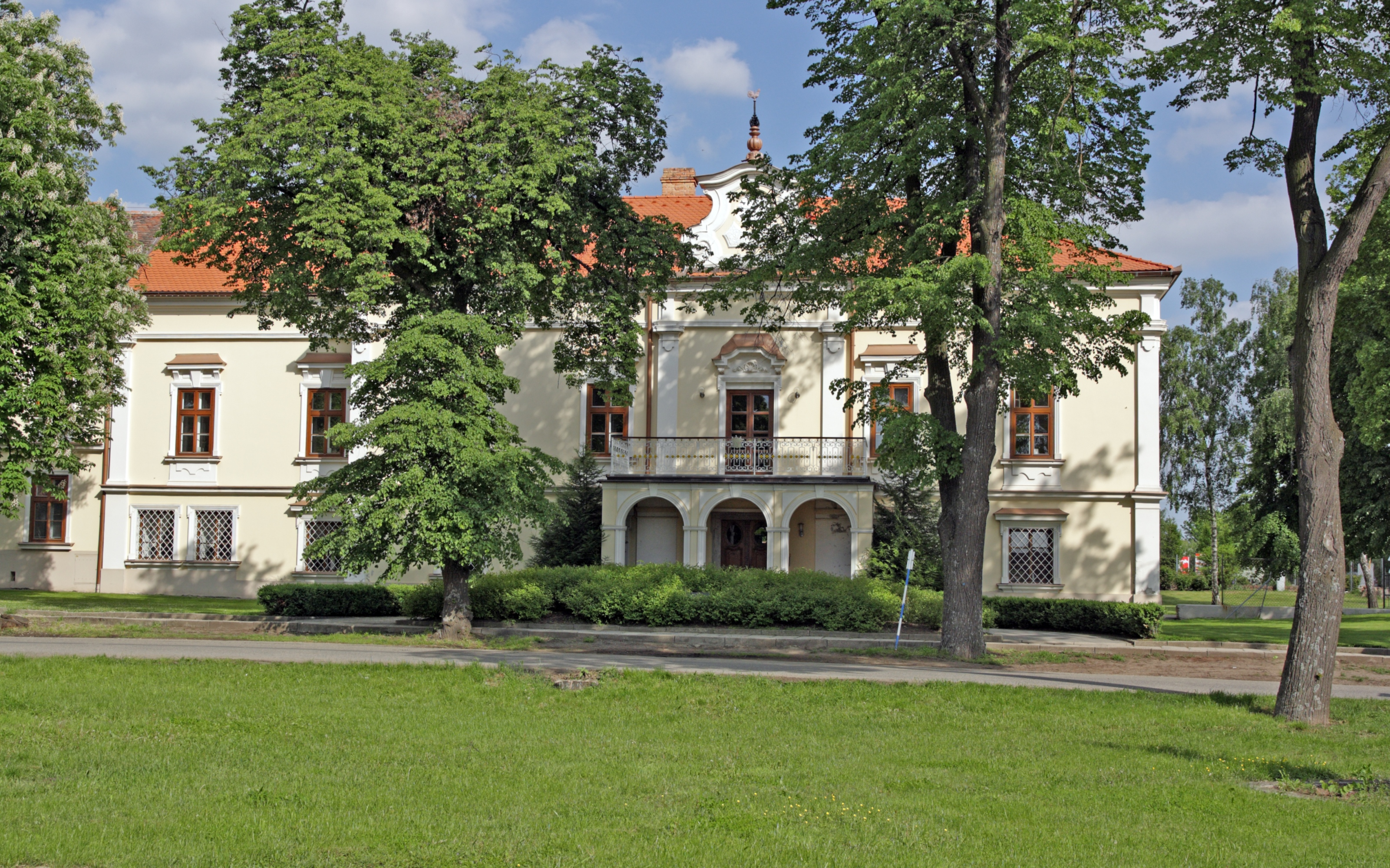 Zámek Těšany